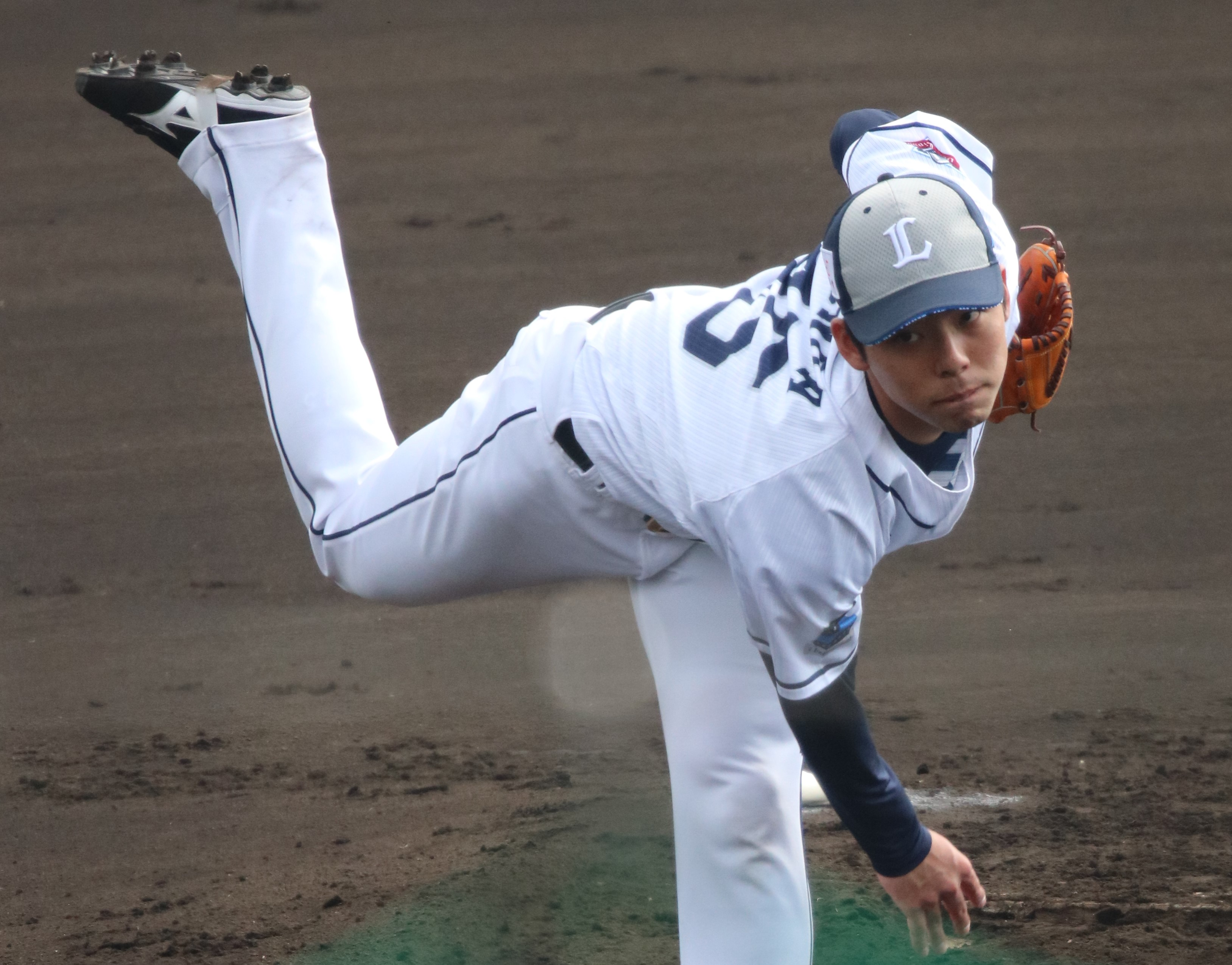 2018/2/9 宮崎・南郷キャンプ